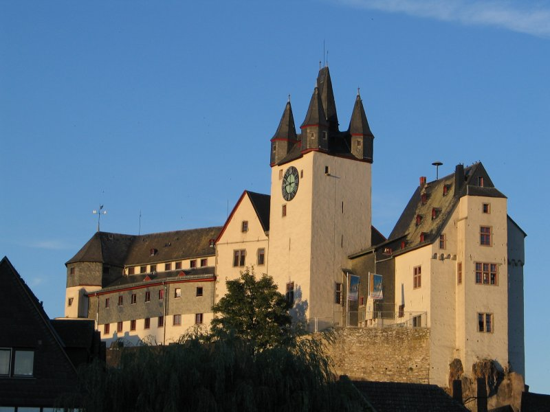 Fürstenschloss Diez